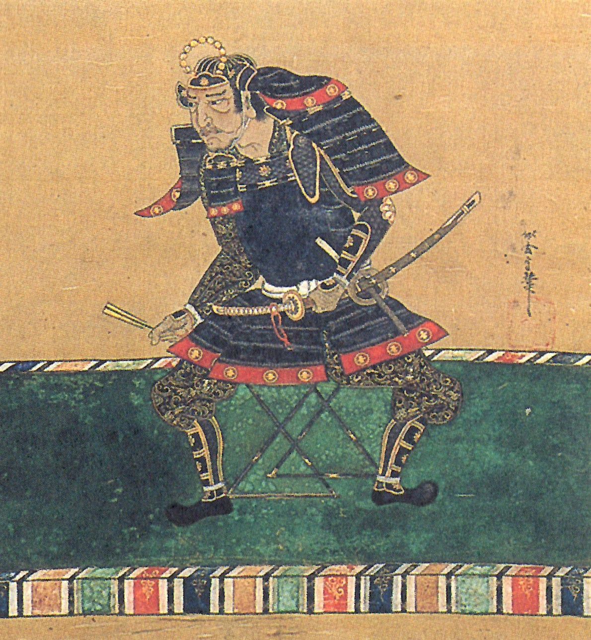 奥山常辰の肖像。